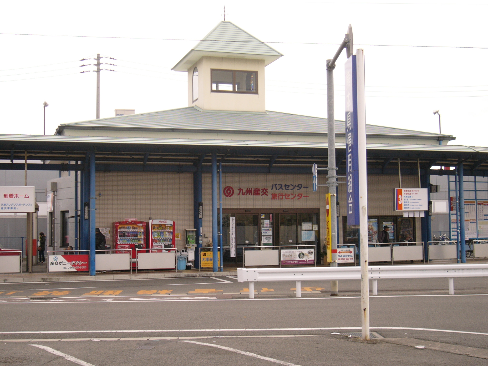 本渡バスセンター（敷地外からの撮影）